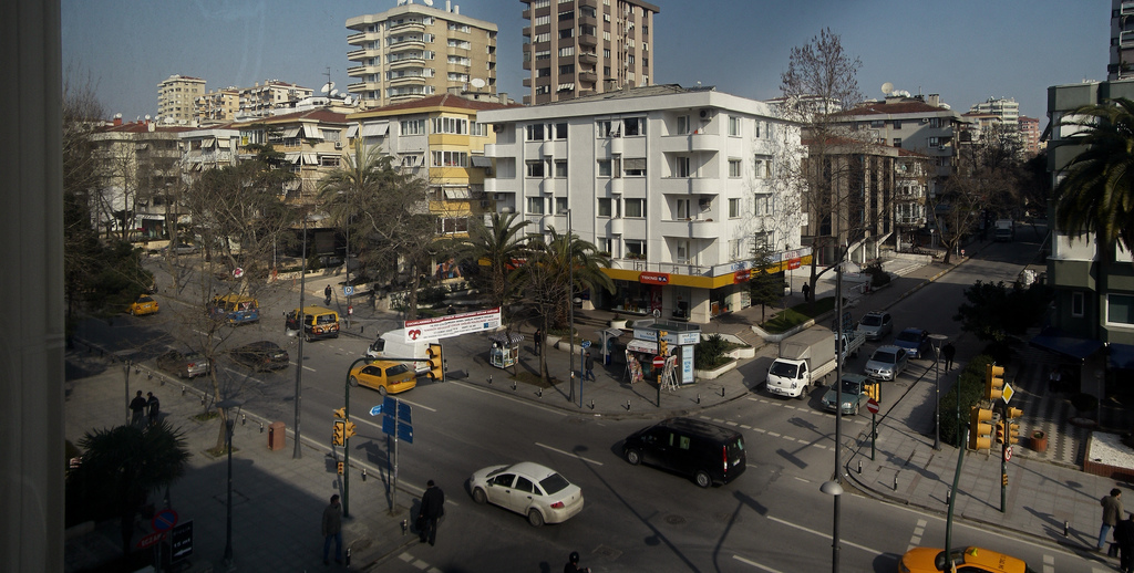 Bağdat Avenue (en turco: Bağdat Caddesi, literalmente Avenida de Bagdad) es una significativa vía principal en el lado asiático de Estambul, Turquía. En términos de importacia y glamour puede ser vista como la homóloga de Istiklal Cad. en el lado europeo. La avenida recorre 6 km desde Bostancı hasta Kızıltoprak, prácticamente paralela con la línea de costa del Mar de Mármara, dentro del distrito de Kadıköy.